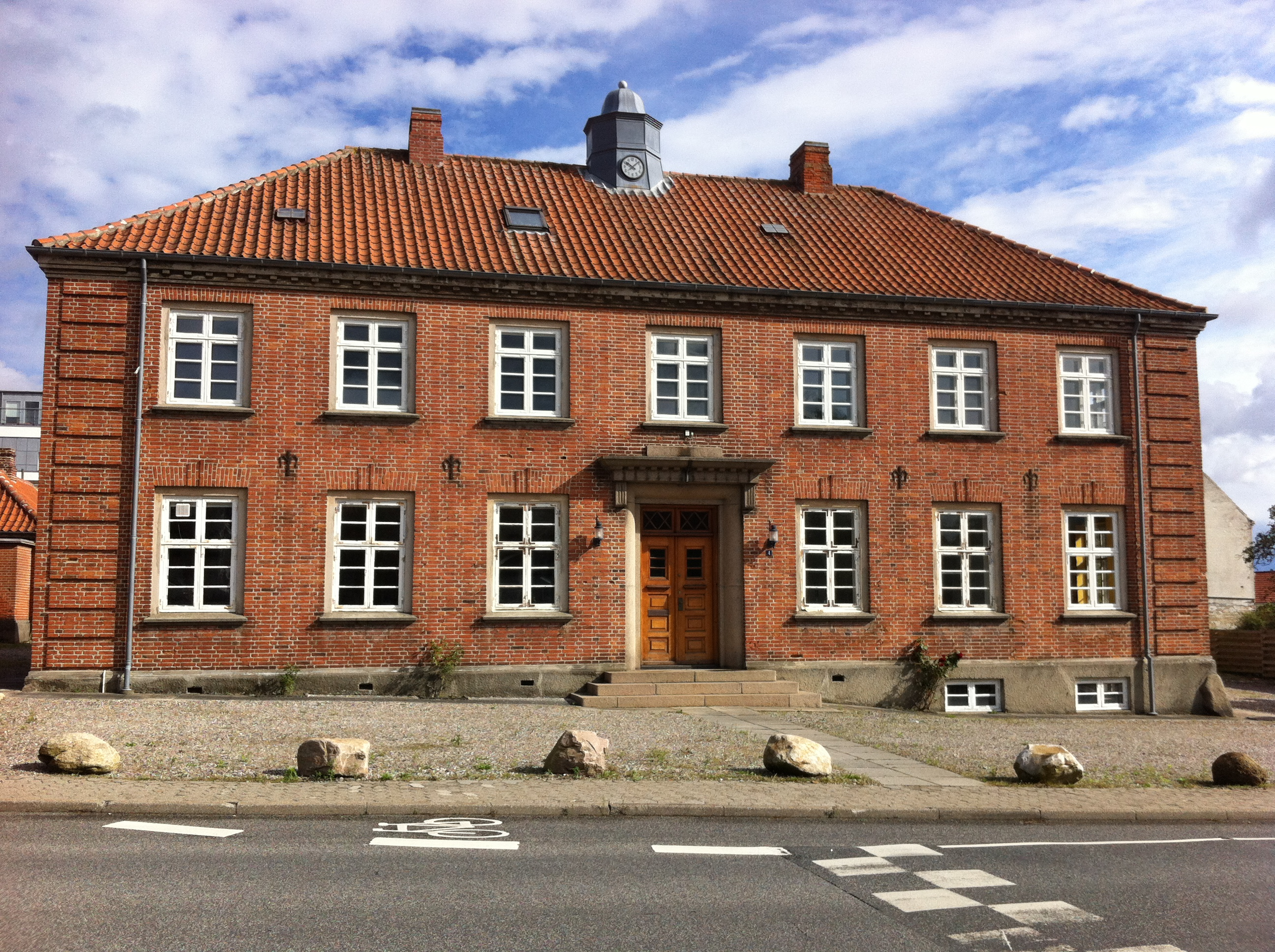 Hadsund Politigård i Tinggade